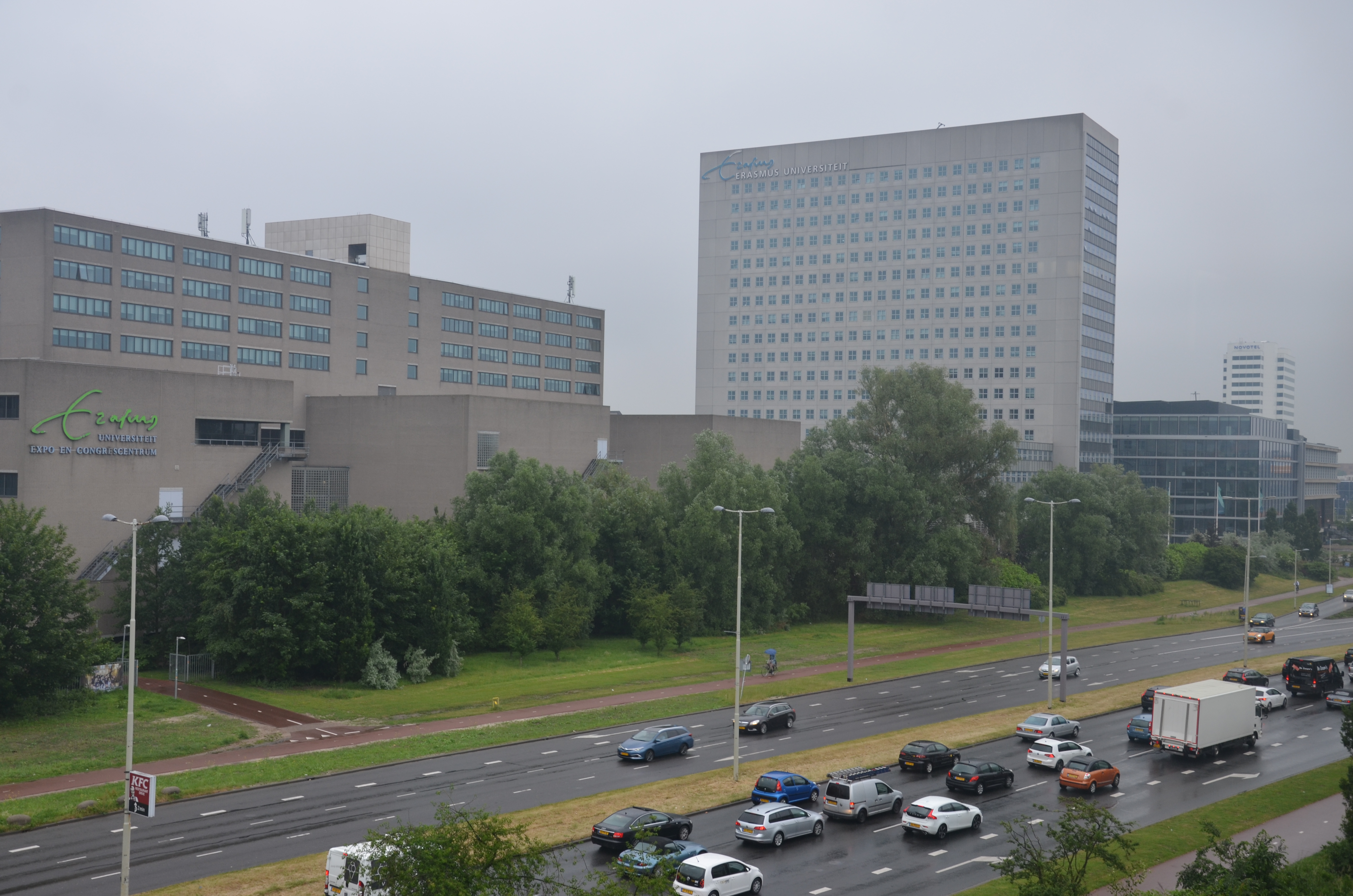 Op de voorgrond de Abram van Rijckevorselweg, op de achtergrond de campus van de Erasmus Universiteit.